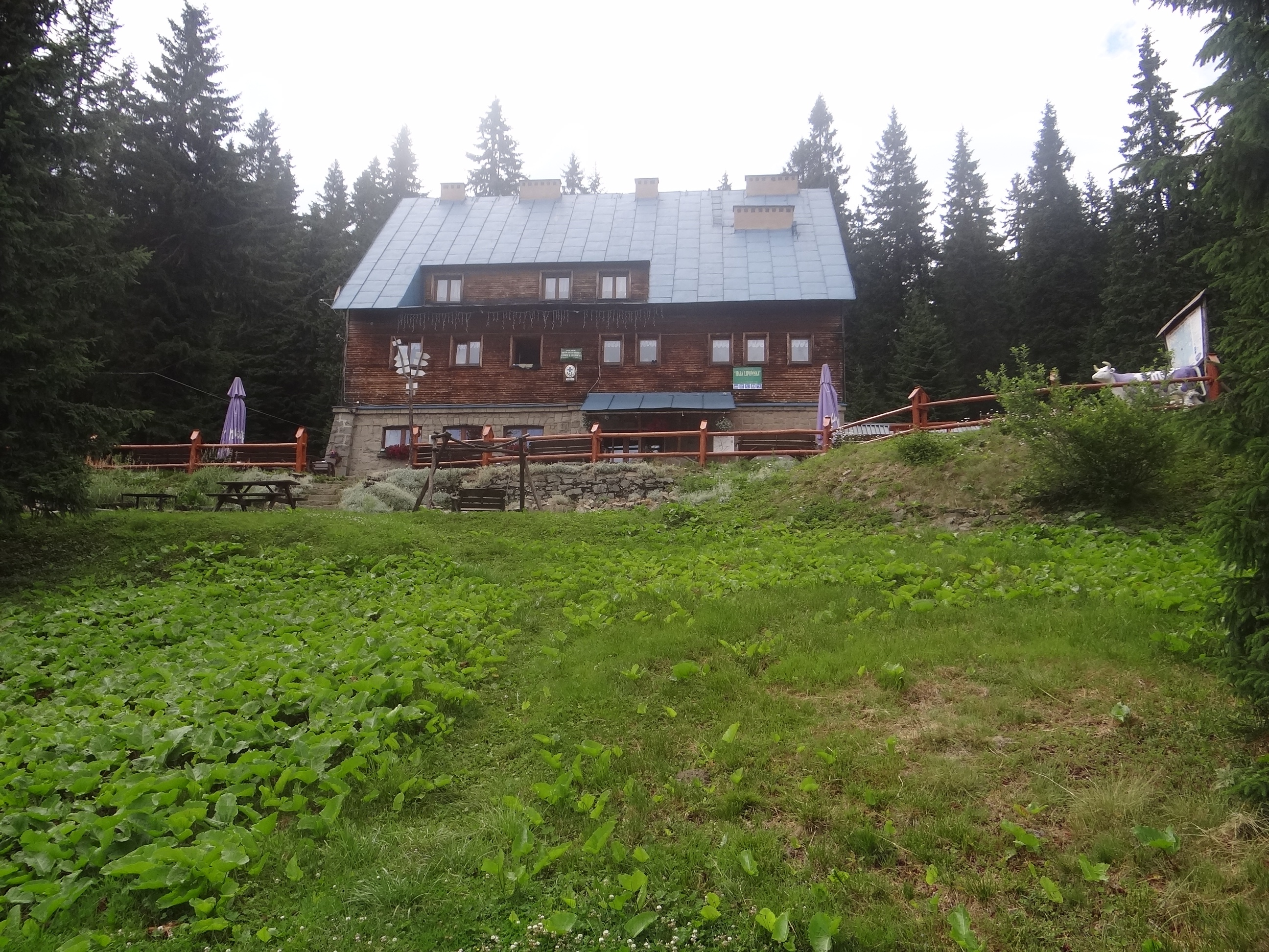 Hala Lipowska